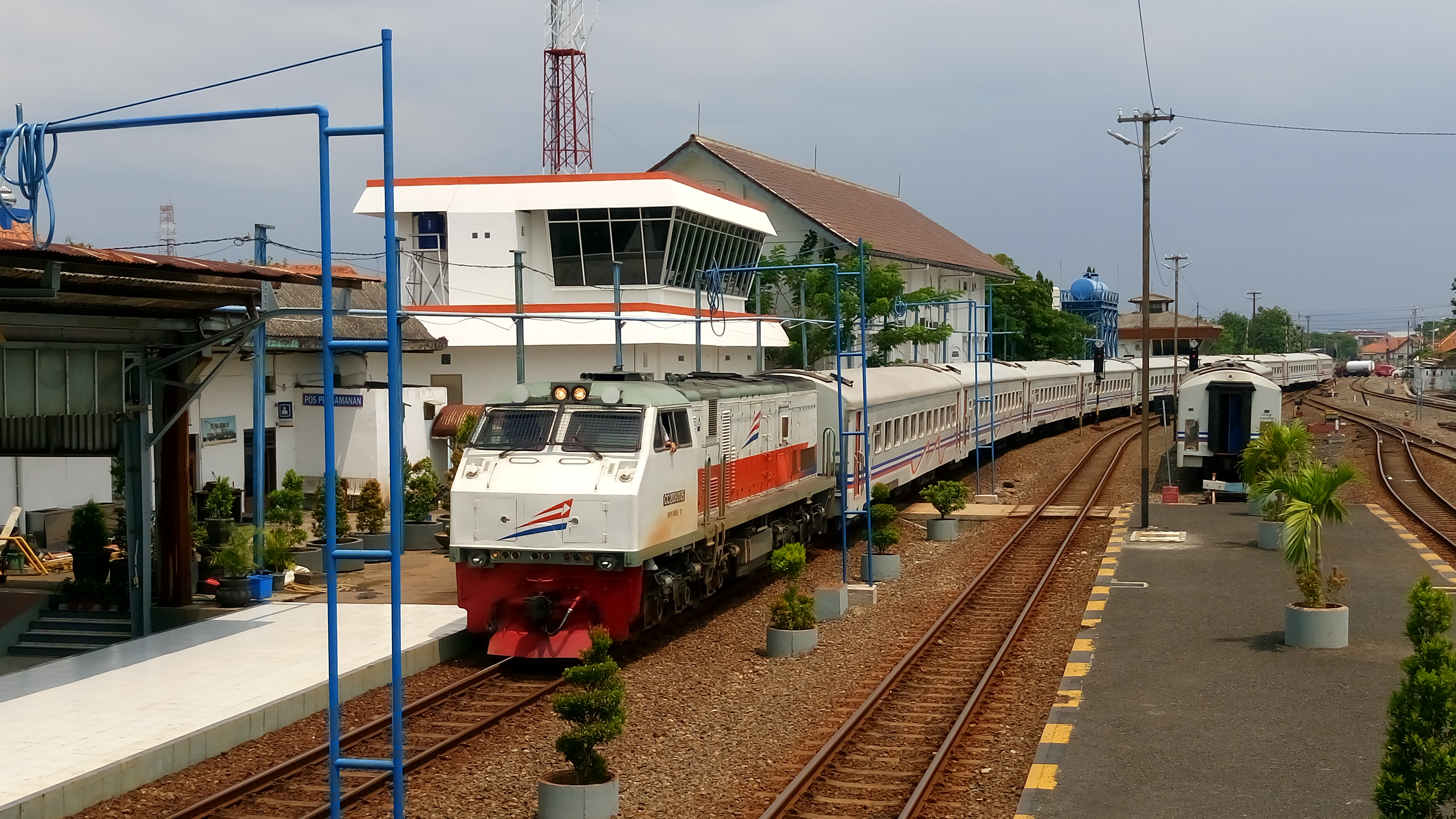 Kereta api Maharani memasuki Stasiun Tawang, Semarang